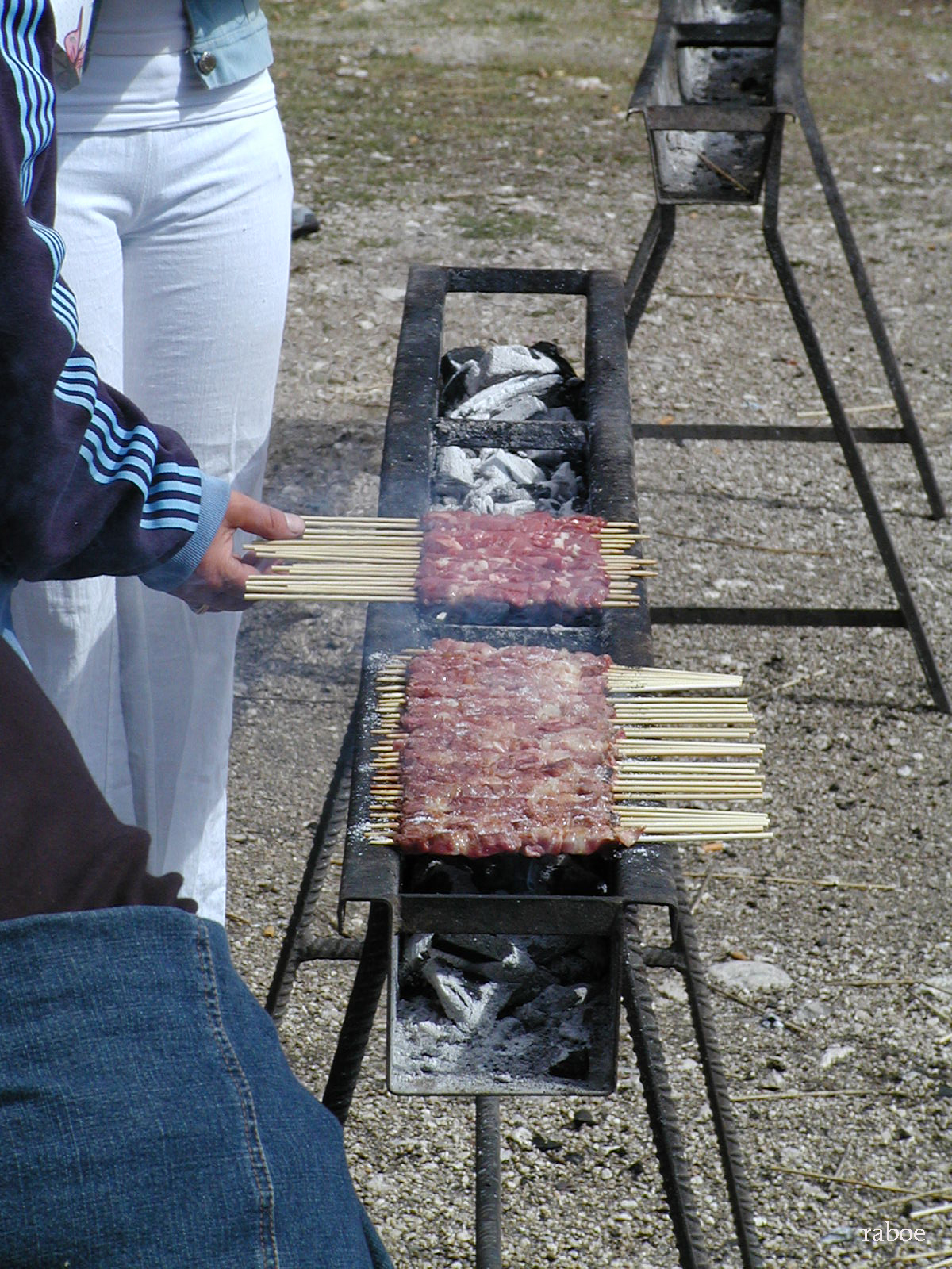 Arrosticini